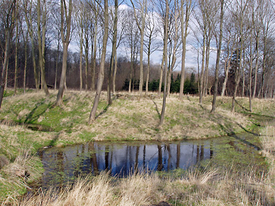 Bjørnkær Voldsted (Gosmer Sogn, Hads Herred, Århus Amt, Denmark) Den indre voldgrav. image by me user:Nico-dk /Nils Jepsen